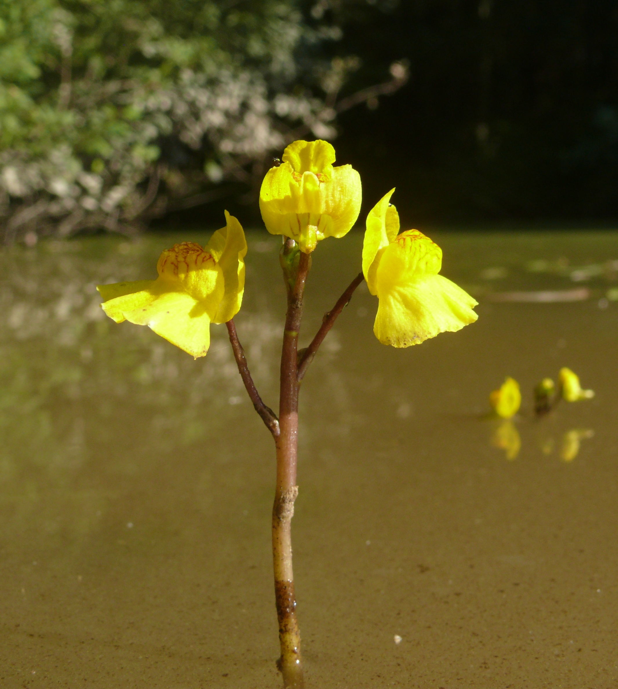 Utricularia australis, Schwäbisch-Fränkische Waldberge, Deutschland